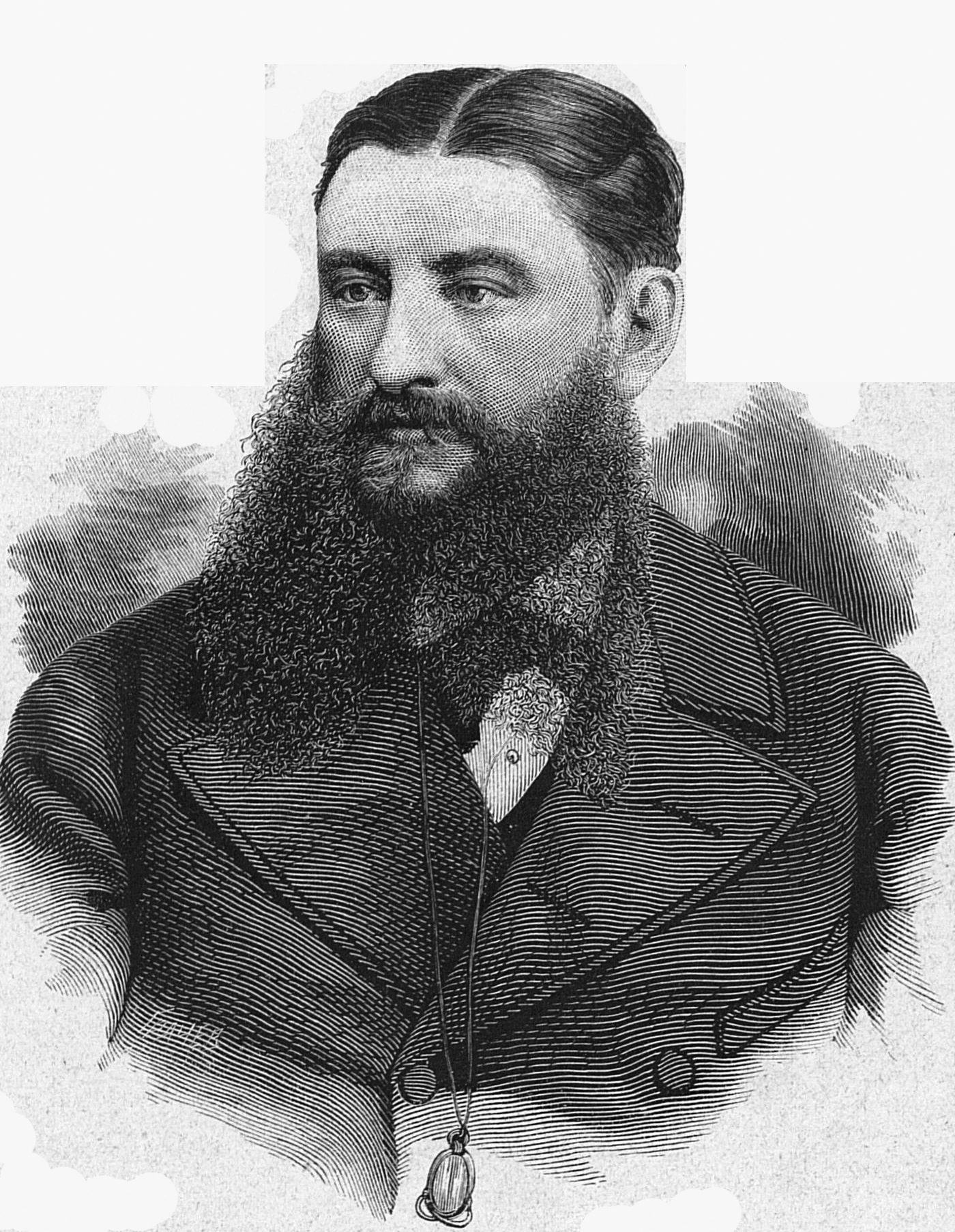 Васильчиков Александр Алексеевич, историк